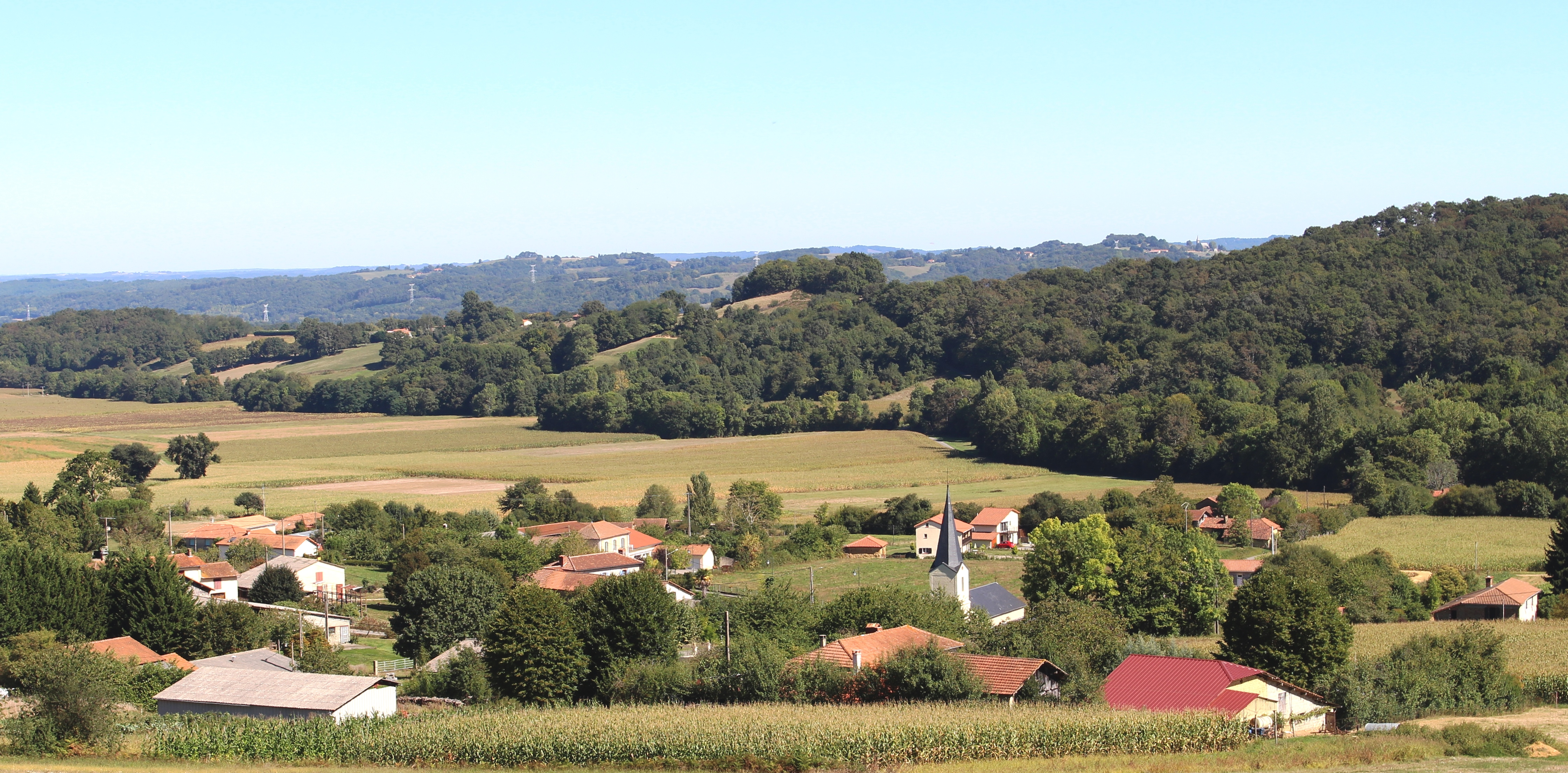 Bugard (Hautes-Pyrénées)